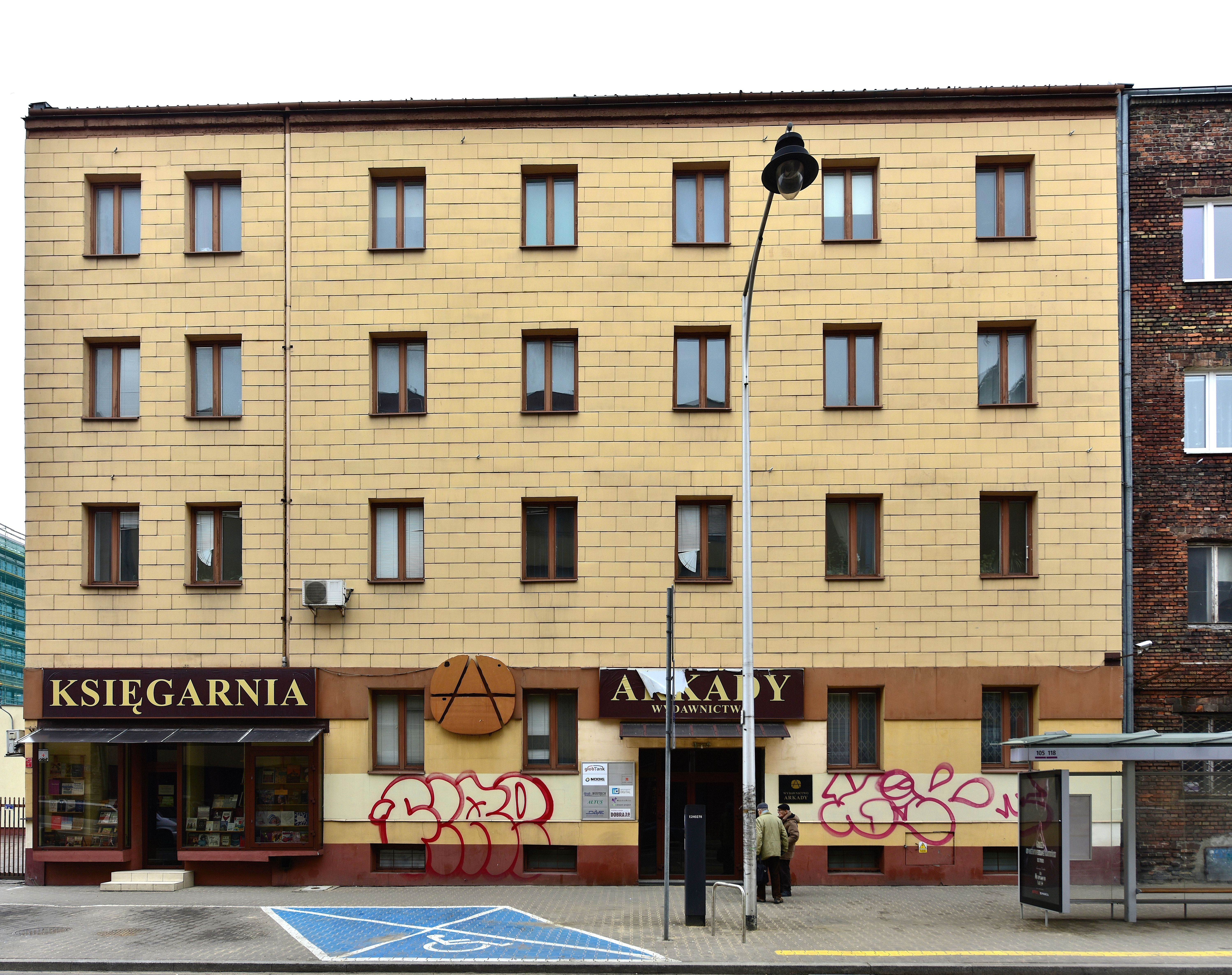 Siedziba Wydawnictwa "Arkady" przy ul. Dobrej 28